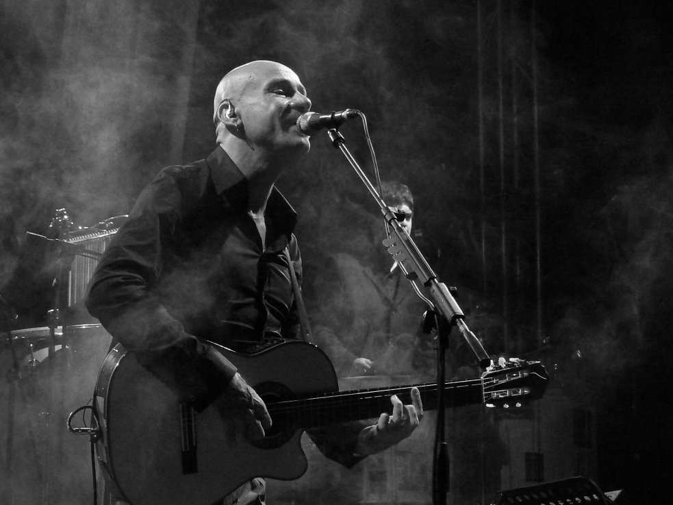 Mario Venuti in concerto a Frosinone (Foto di Marco Medaglia)